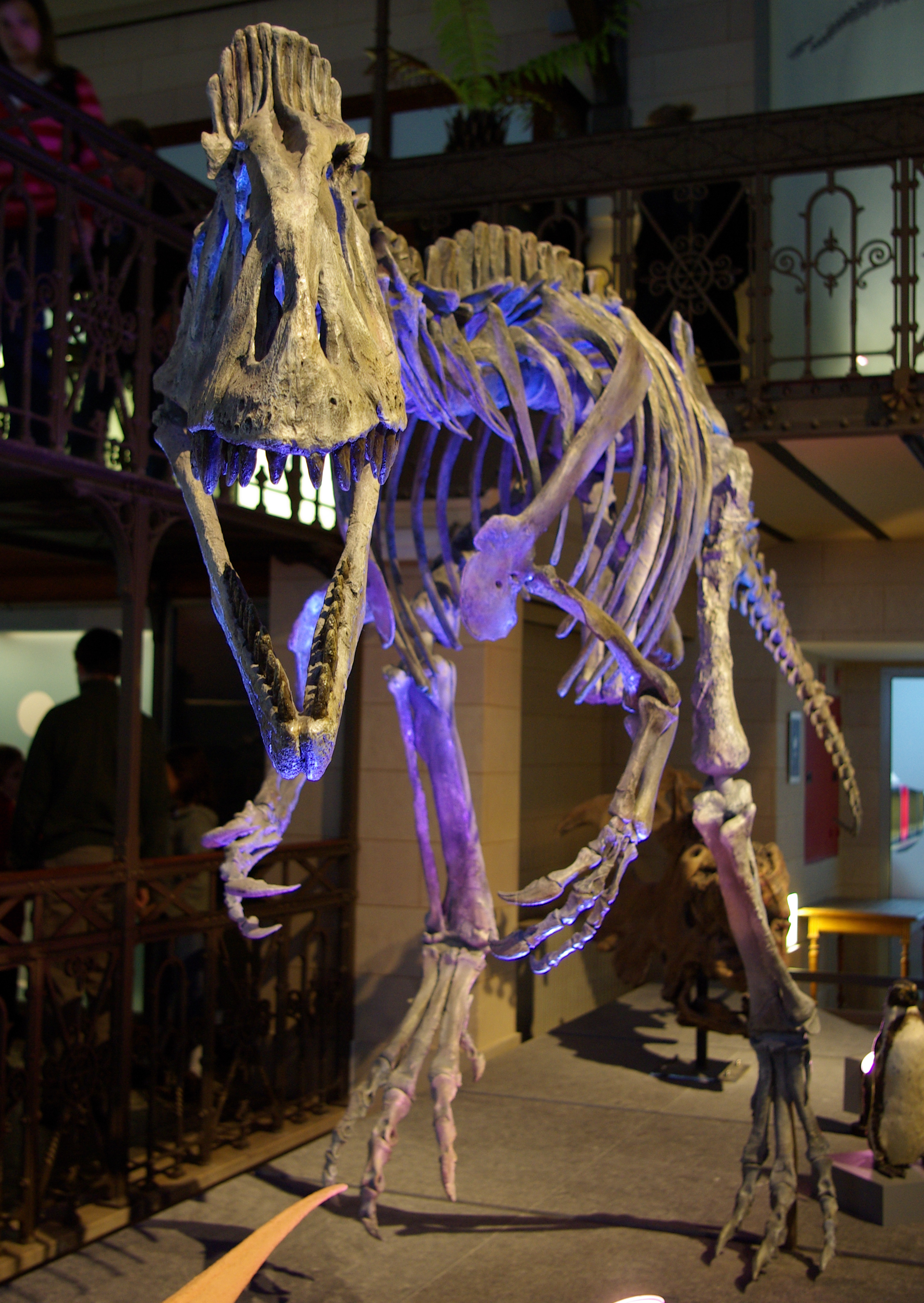 Cryolophosaurus, Museum des Sciences naturelle de BRUXELLES